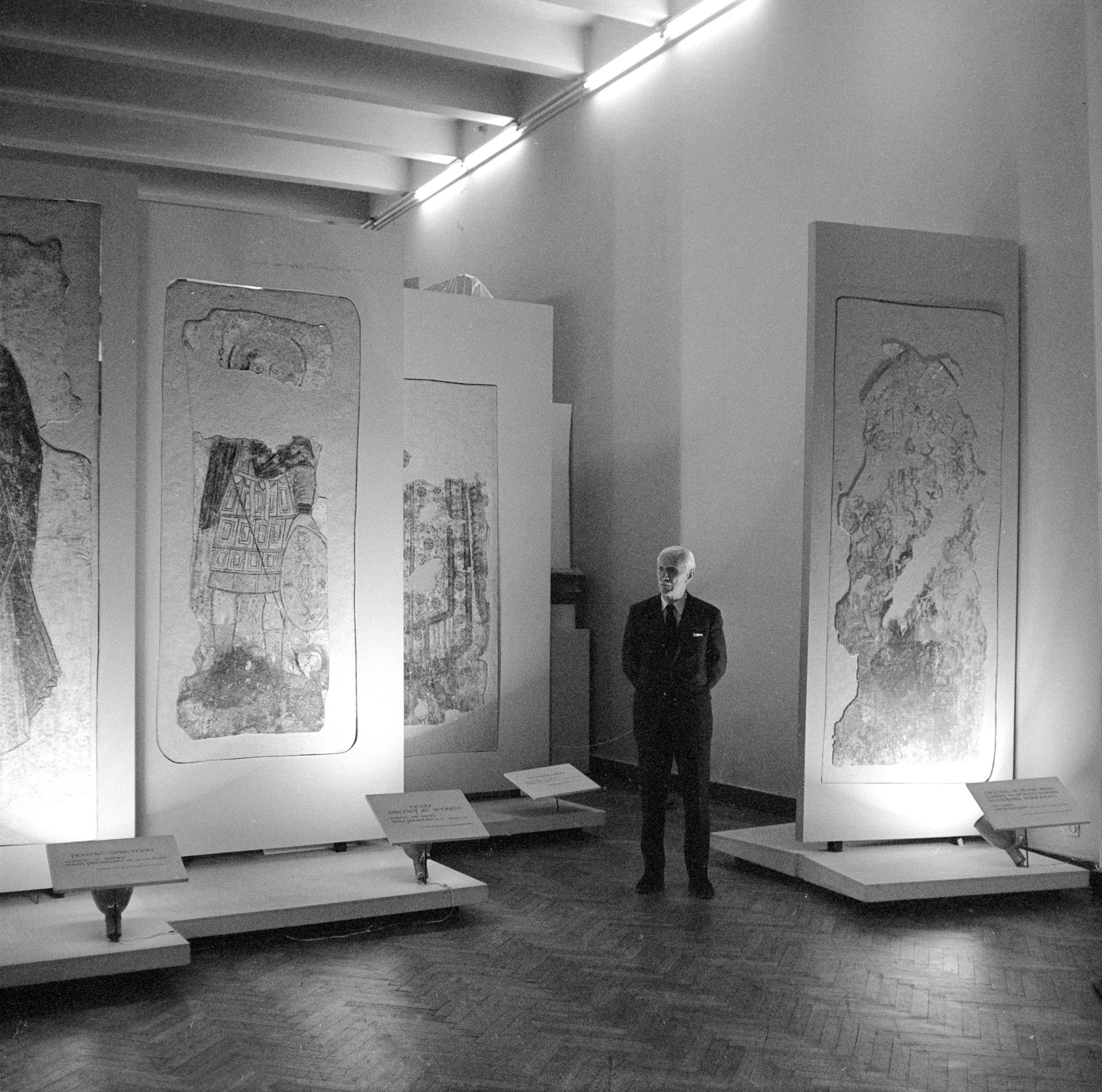 Kazimierz Michałowski na tle malowideł z Faras, Muzeum Narodowe w Warszawie